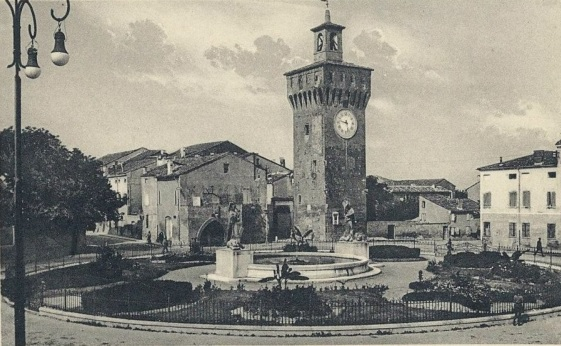 Il monumento i caduti e la torre dei modenesi a Finale Emilia negli anni 1930